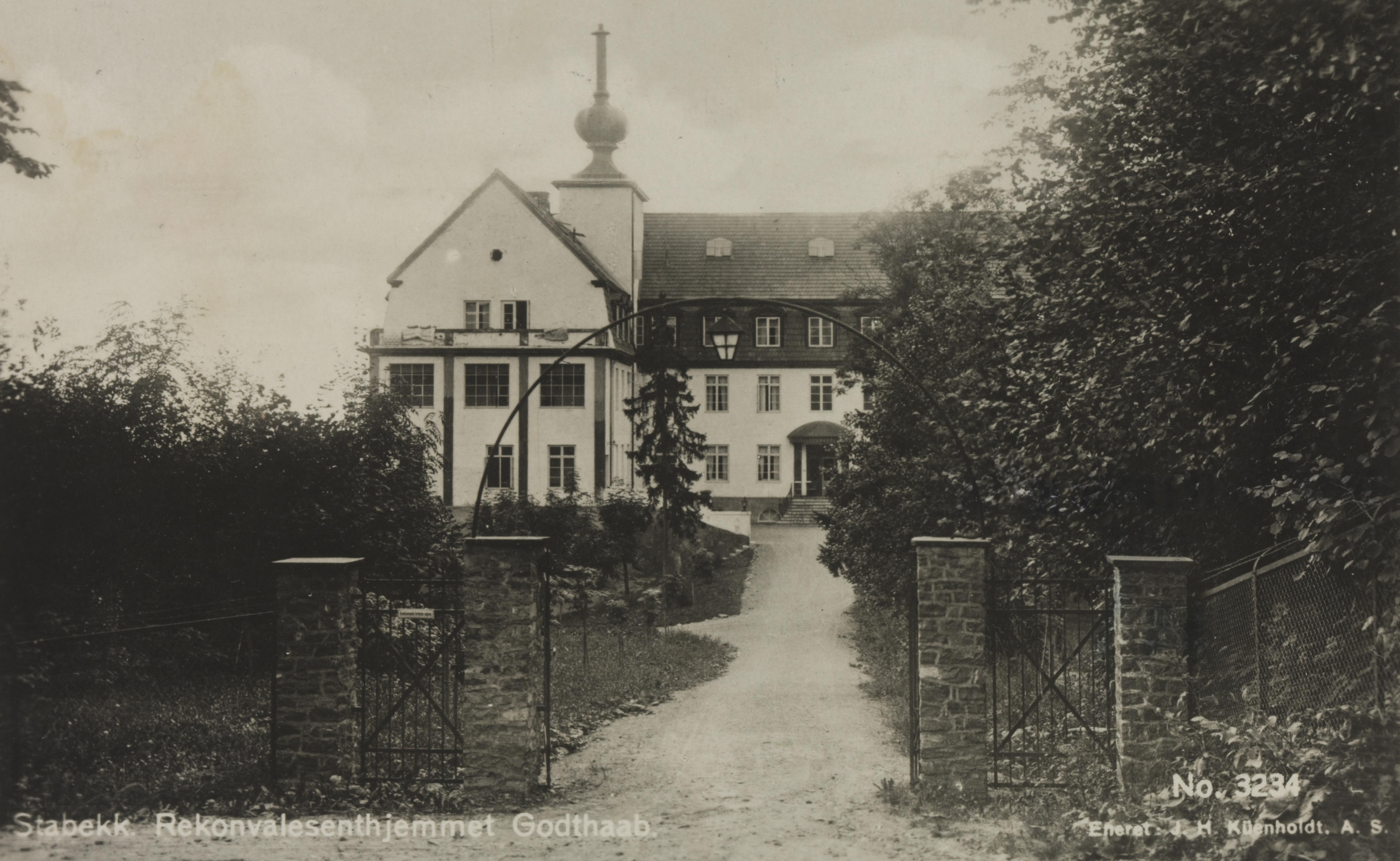 Bildet er hentet fra Nasjonalbibliotekets bildesamling Bekkestua,Bærum, Bærum, Akershus